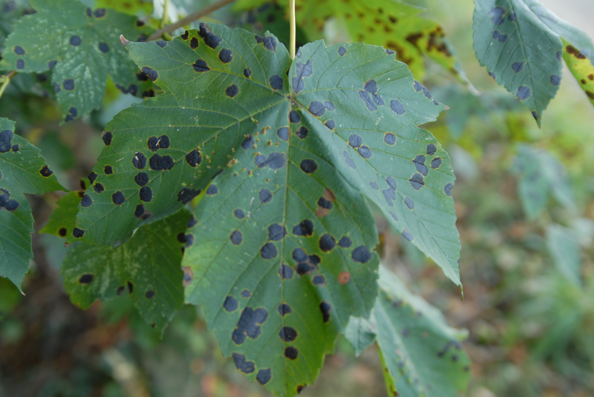 Teerflecken auf Bergahorn